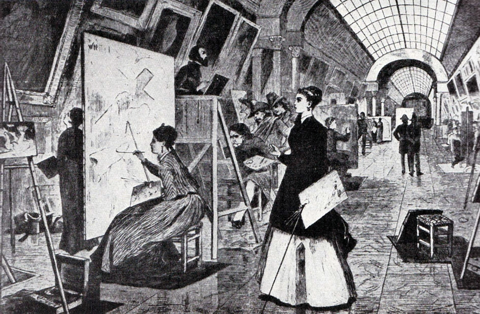 Gravură de epocă - Copiști în marea galerie de la Luvru